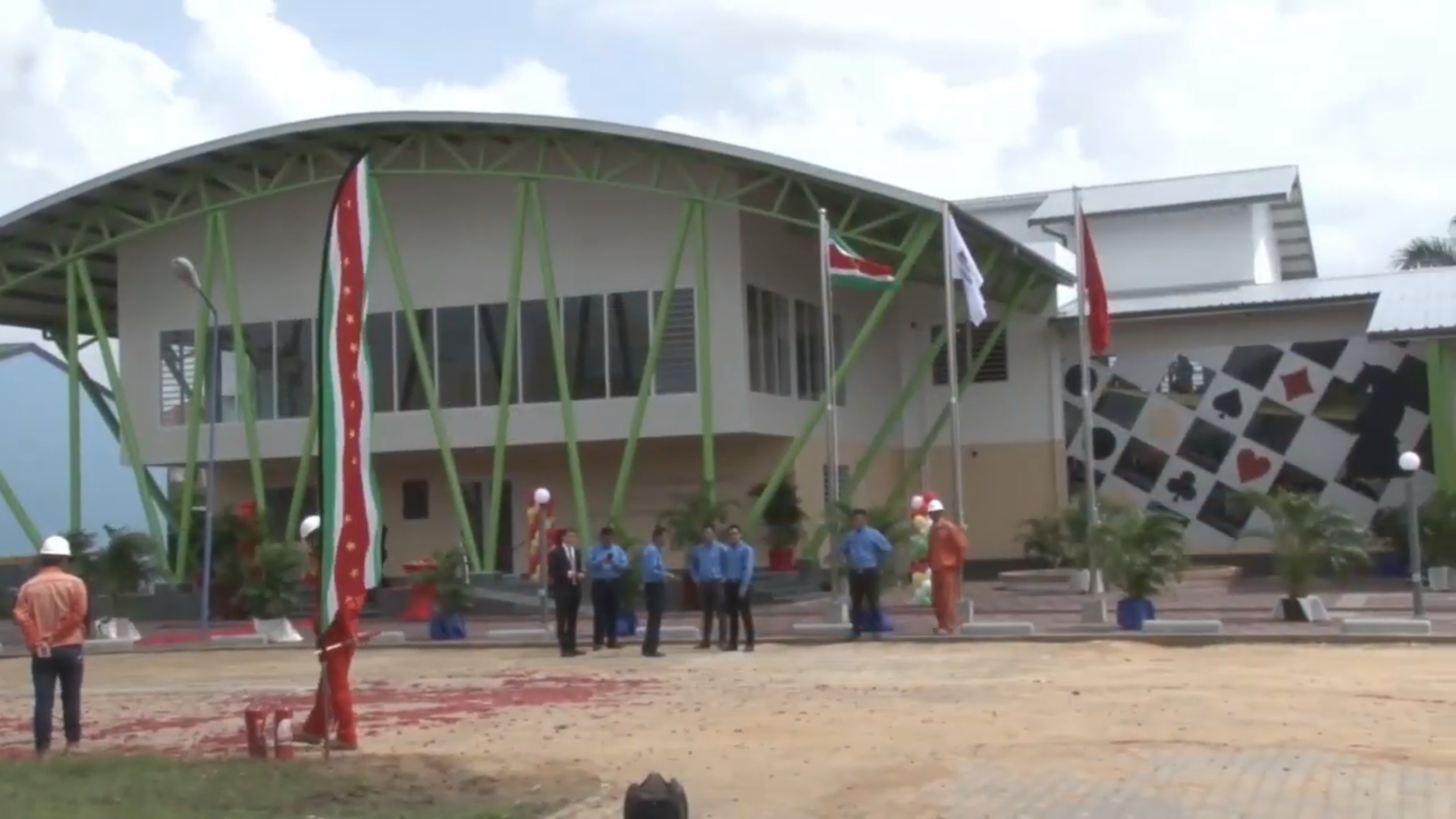 Denksport Centrum, op het terrein van de Anton de Kom Universiteit van Suriname, Paramaribo